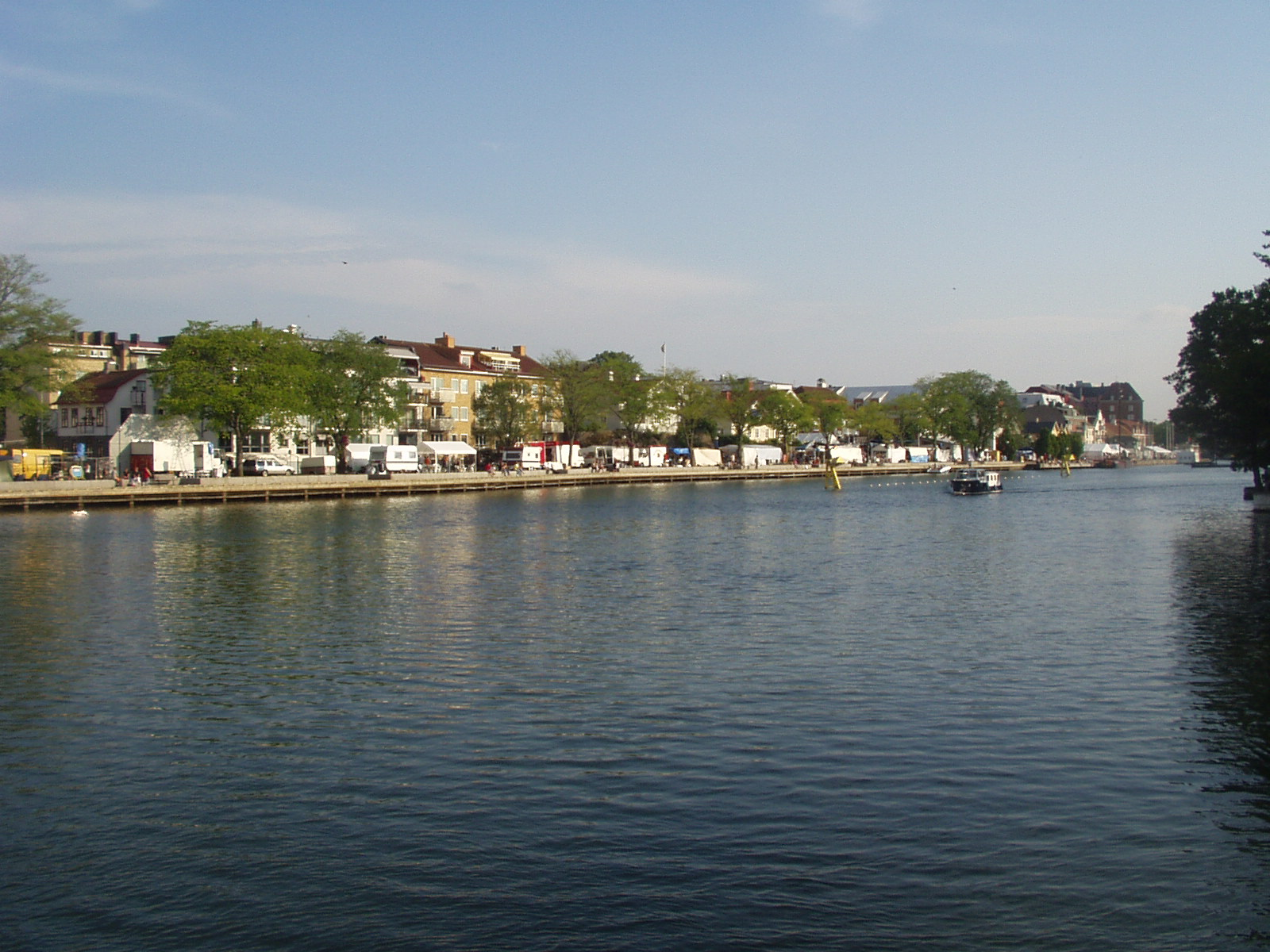 Beskrivning: Strandgatan, Trollhättan Juli 2006 Fotograf: Kristian Persson (jag själv)